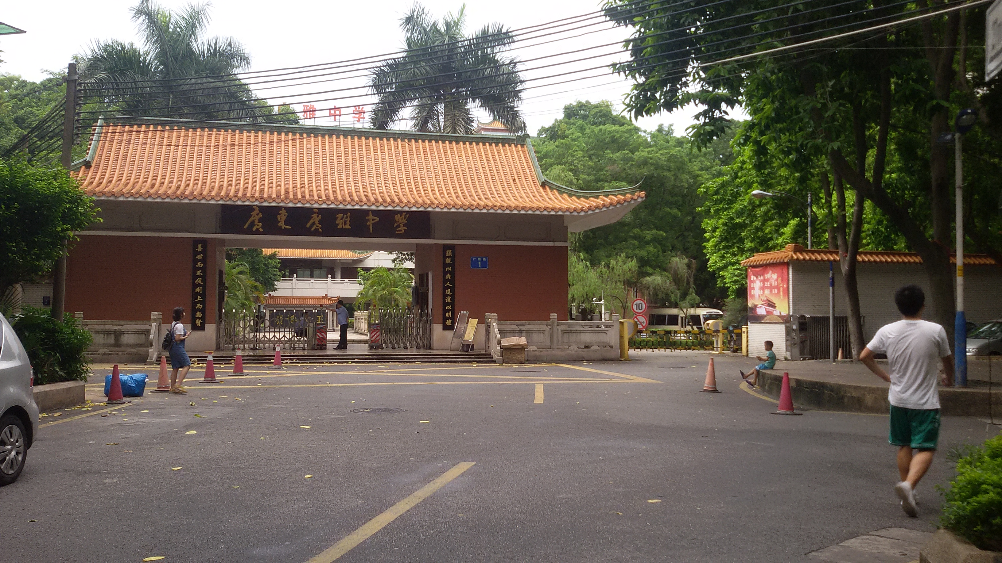 粵語: 廣東廣雅中學嘅正門